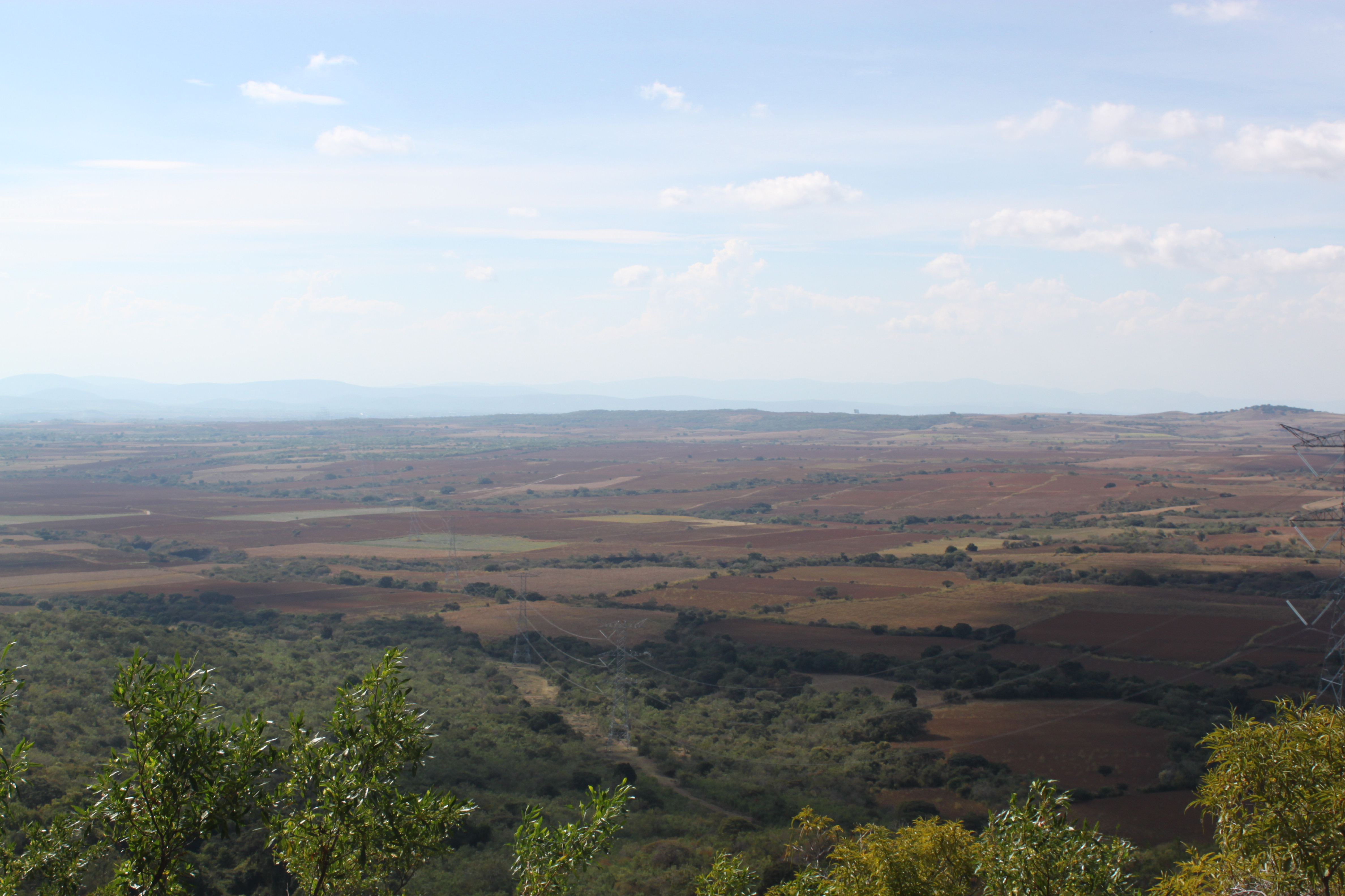 Campos de sorgo y lineas de alta tensión en Tlacotepec, Morelos, México.